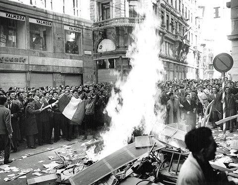 Rivolta di Trieste, scontri tra filoitaliani e indipendentisti davanti alla sede del Movimento Autonomista Giuliano (MAG).